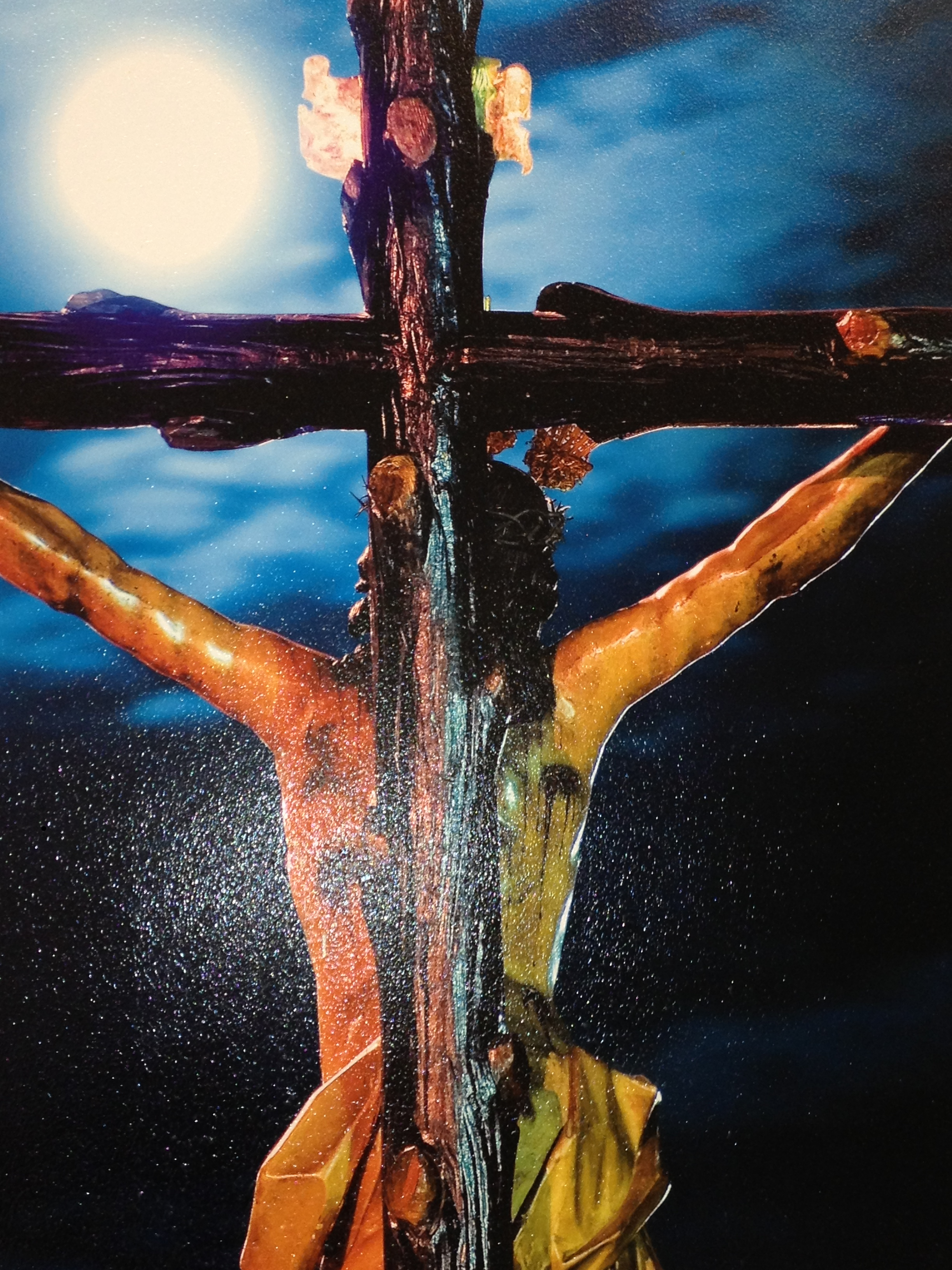 Cristo de la Expiración en el cartel de la Semana Santa de Cádiz 2009